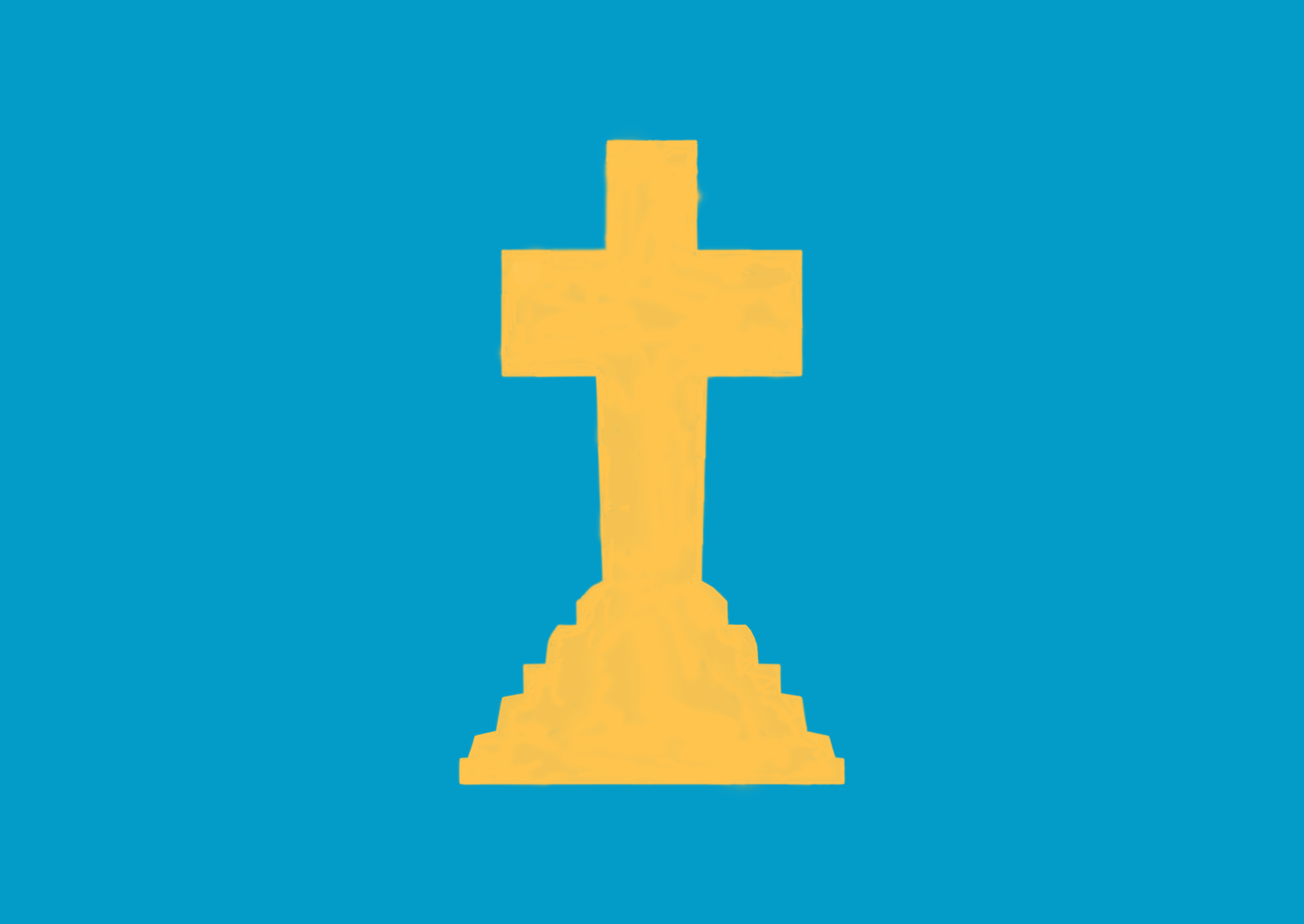 Bandeira da Laracha, A Coruña, Galiza Spain